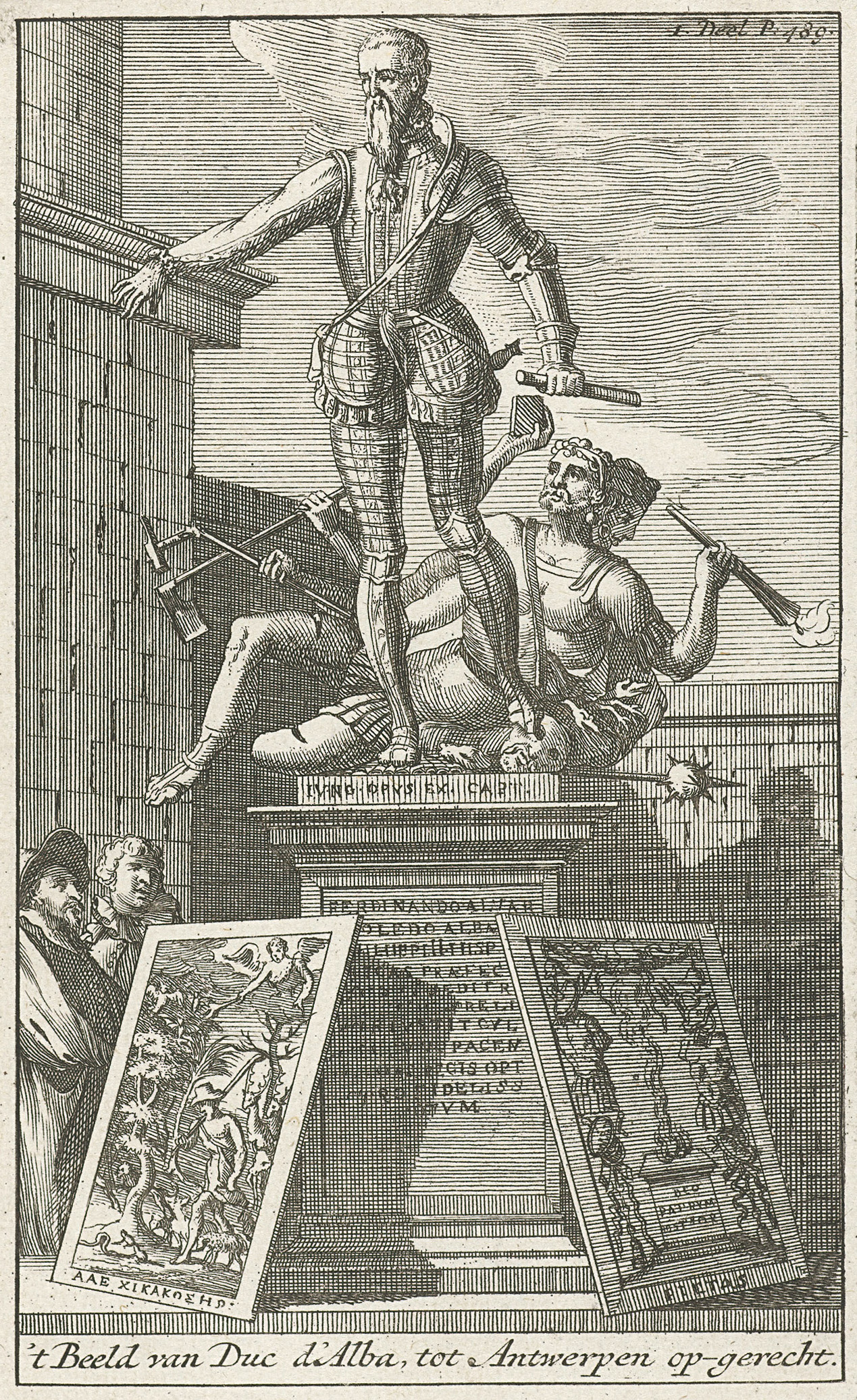 Standbild Herzog Albas in der Zitadelle von Antwerpen Technik: Radierung und Stich